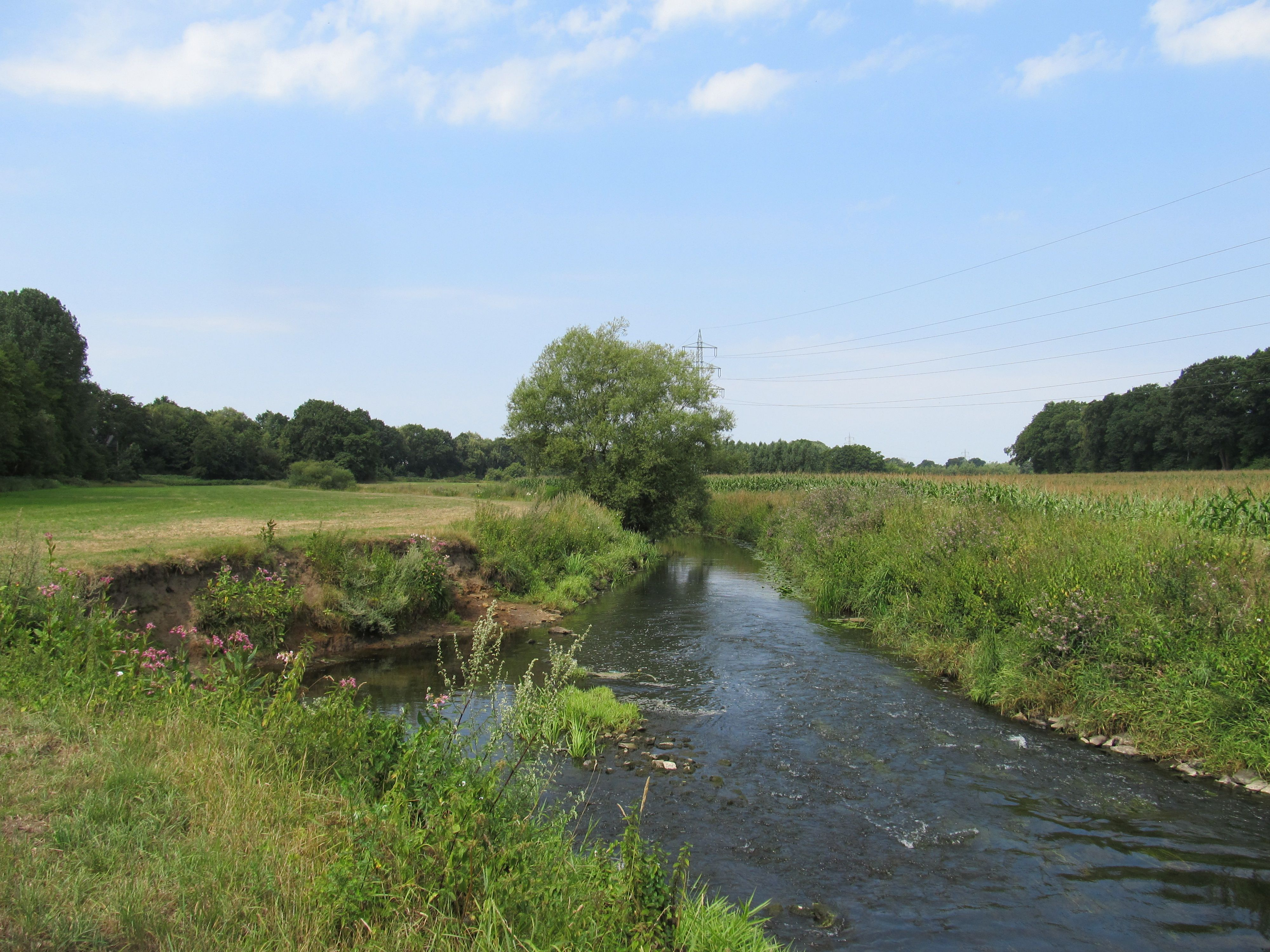 Hase (Fluss) unweit des Stichkanals in Hollage